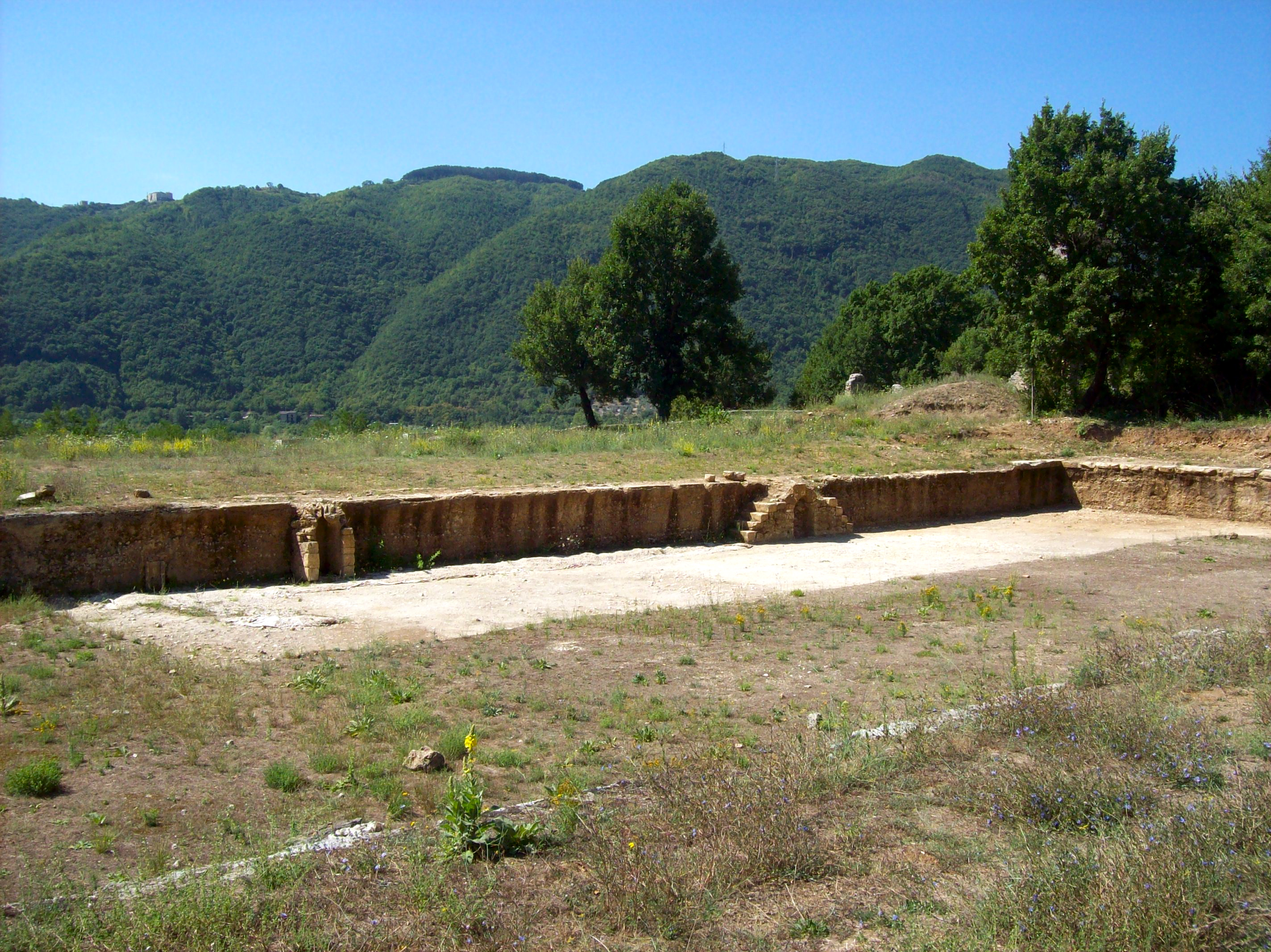 Terme di Vespasiano di Aquae Cutiliae (Castel Sant'Angelo - Rieti)